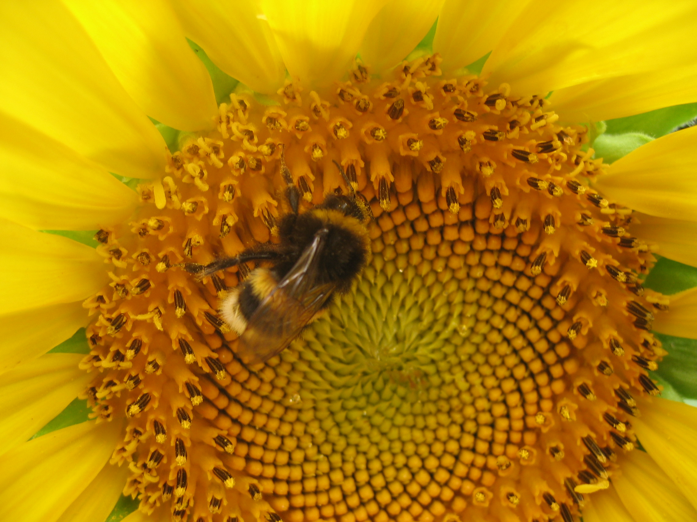 auteur : Olivier Rousseil (image prise avec un appareil photo numerique Canon Ixius 400)